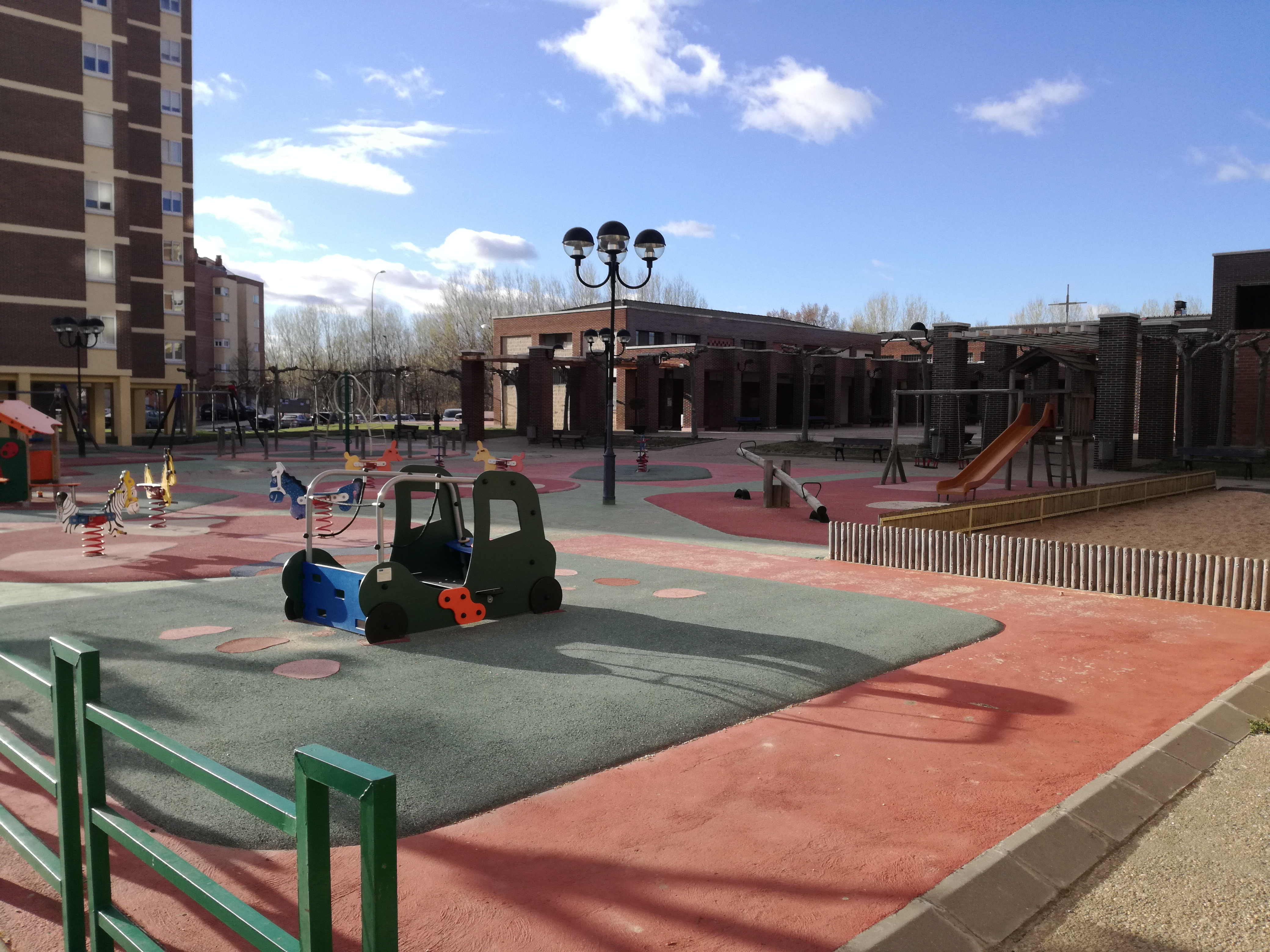 Parque infantil y plaza principal de la urbanización los Olmillos (Palencia)